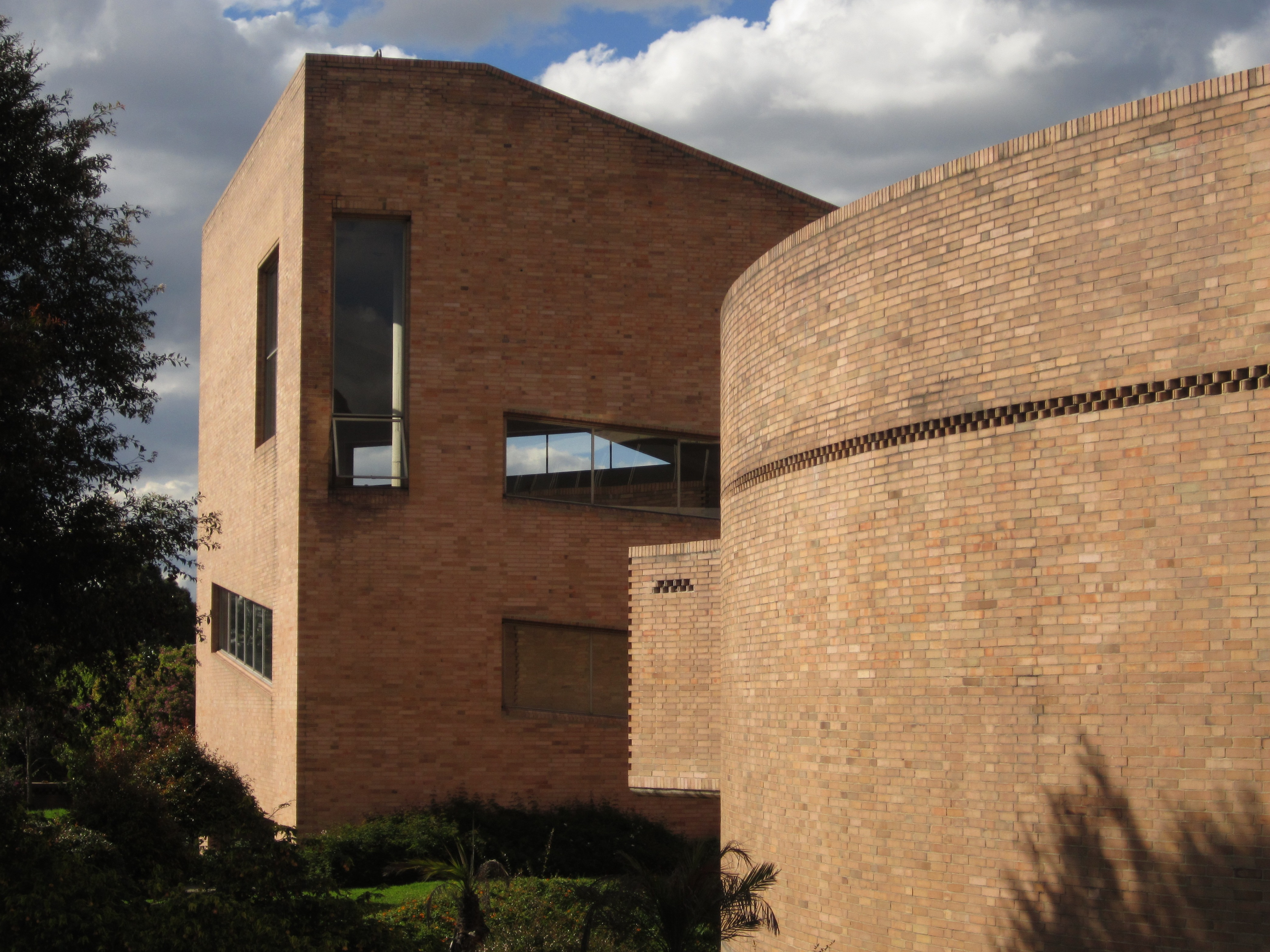 Bogotá Biblioteca Virgilio Barco.